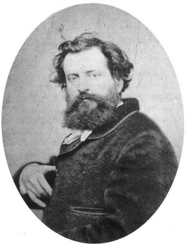 Portrait de François Chifflart